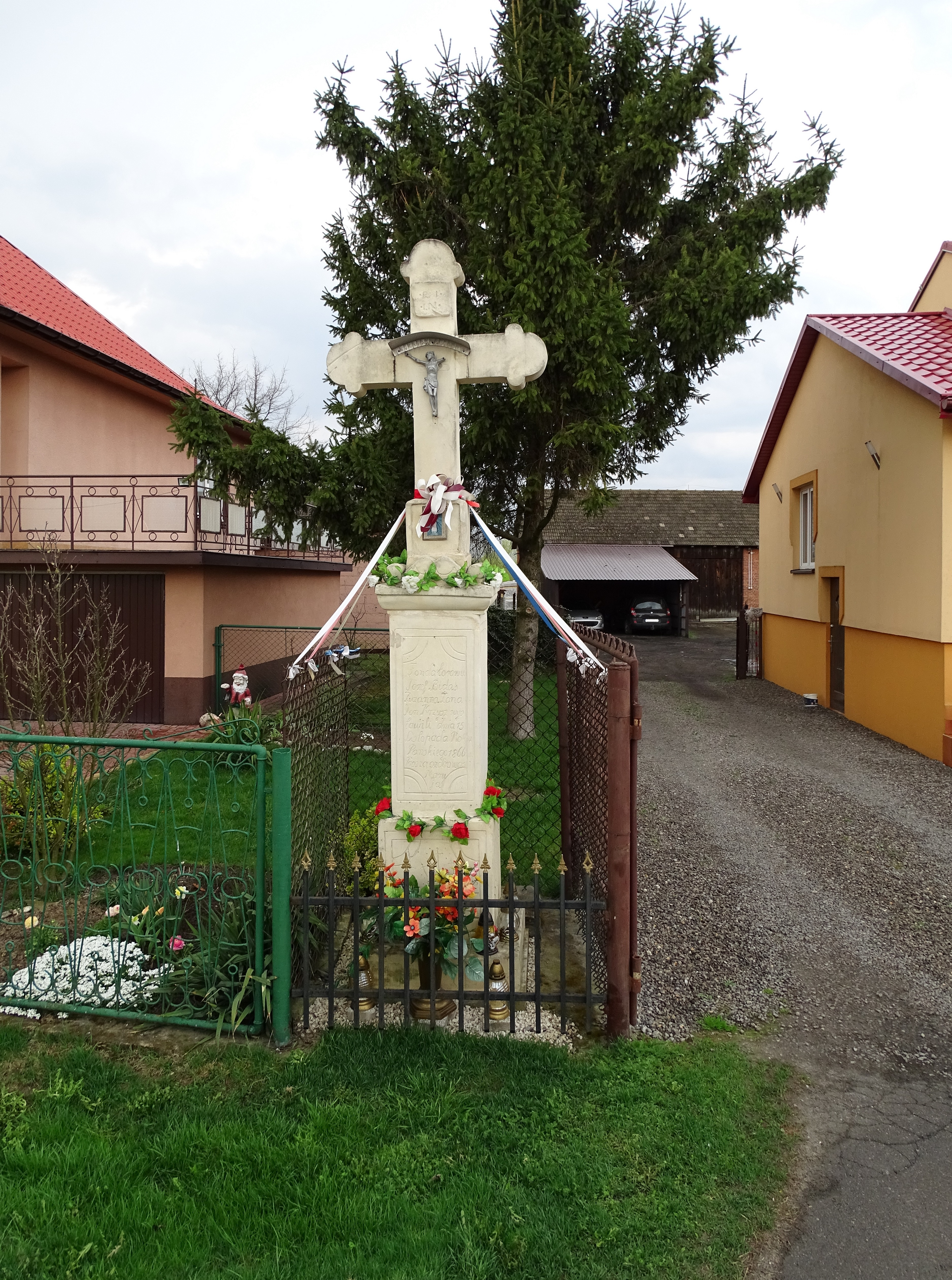 Bożydar, powiat sandomierski, kapliczka z 1866.